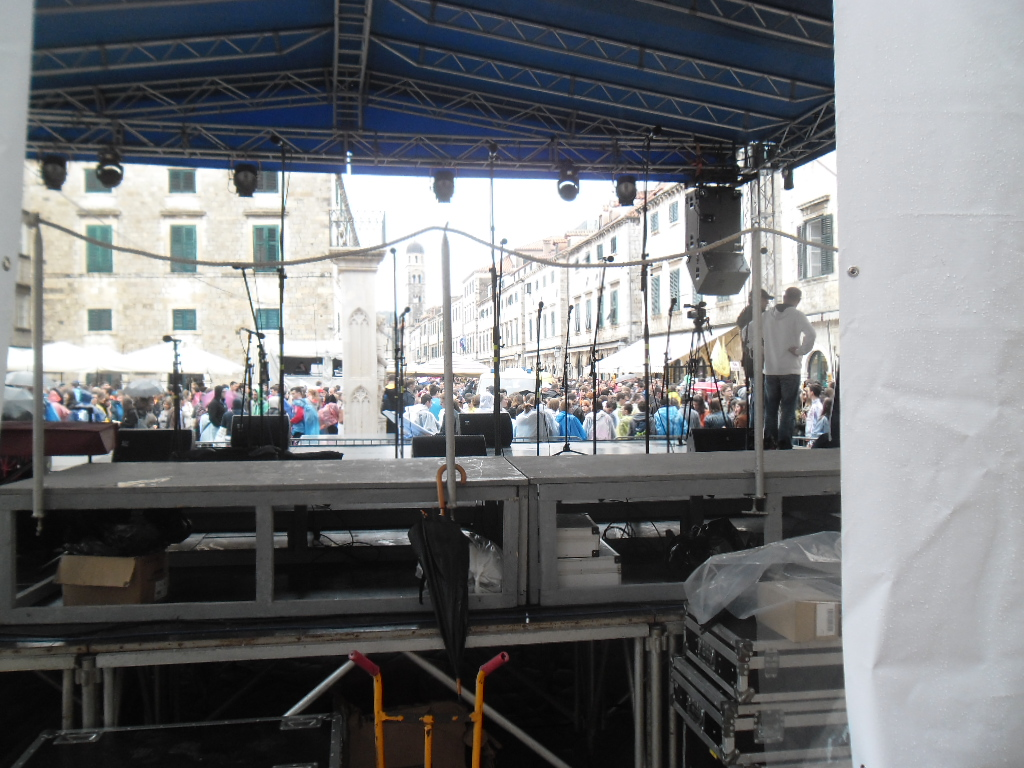 Susret hrvatske katoličke mladeži 2014. (26. travnja) u Dubrovniku